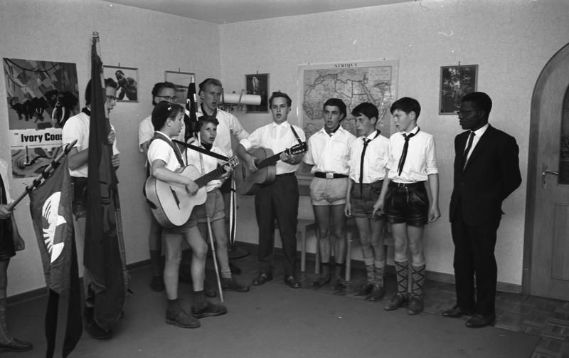 10 deutsche Jugendliche aus Koblenz, die in Afrika waren, in der Botschaft der Elfenbeinküste Information added by Wikimedia users.